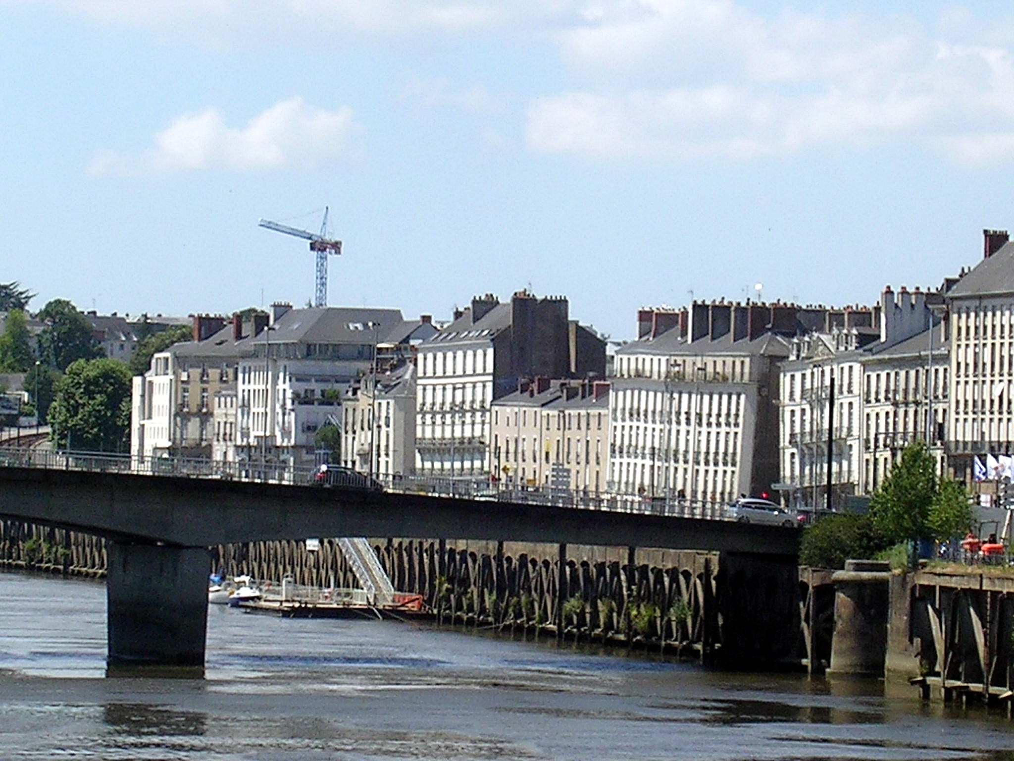 Façades du quai de la Fosse